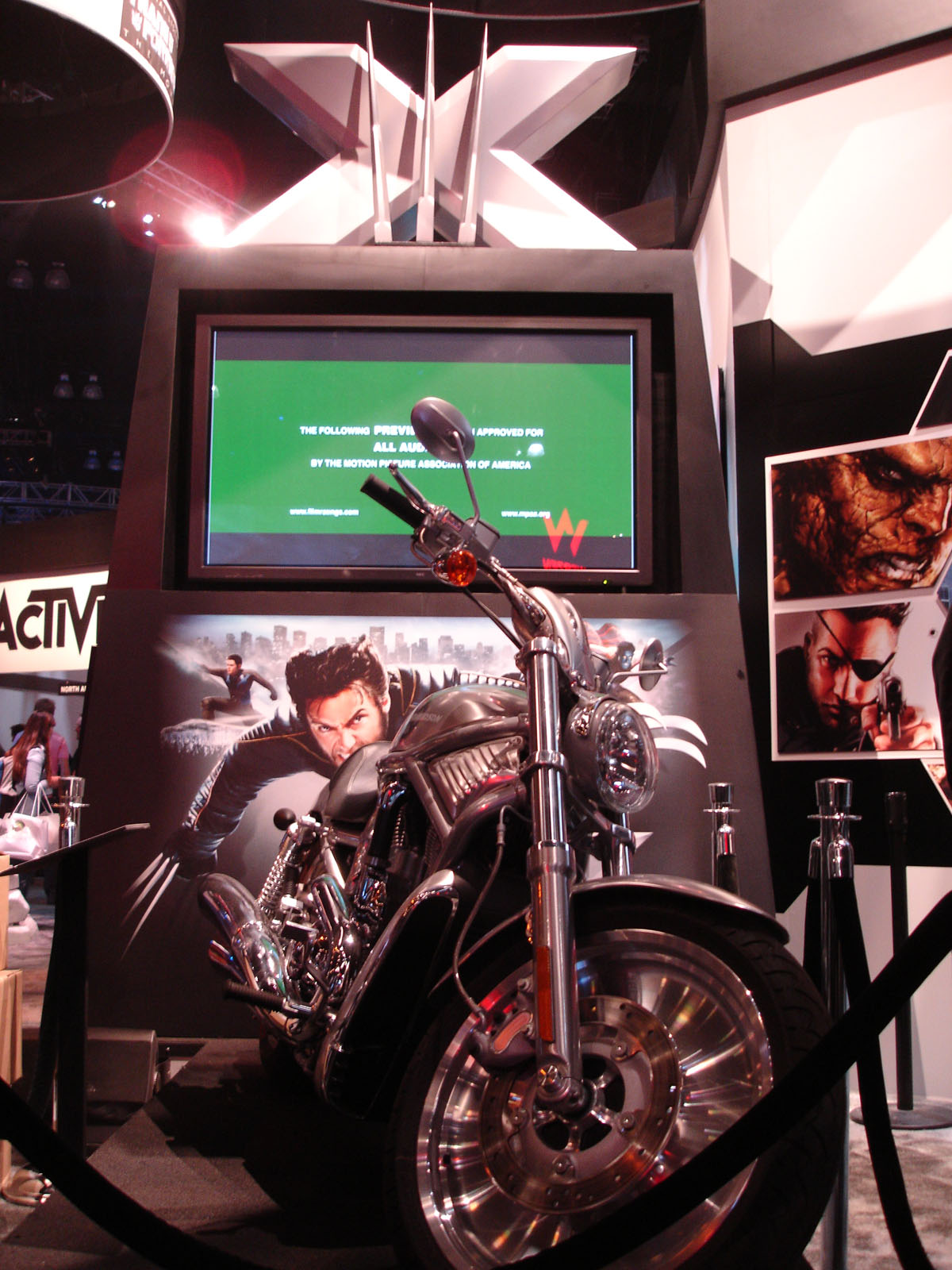 E3 2006 X-Men 3 motorcycle